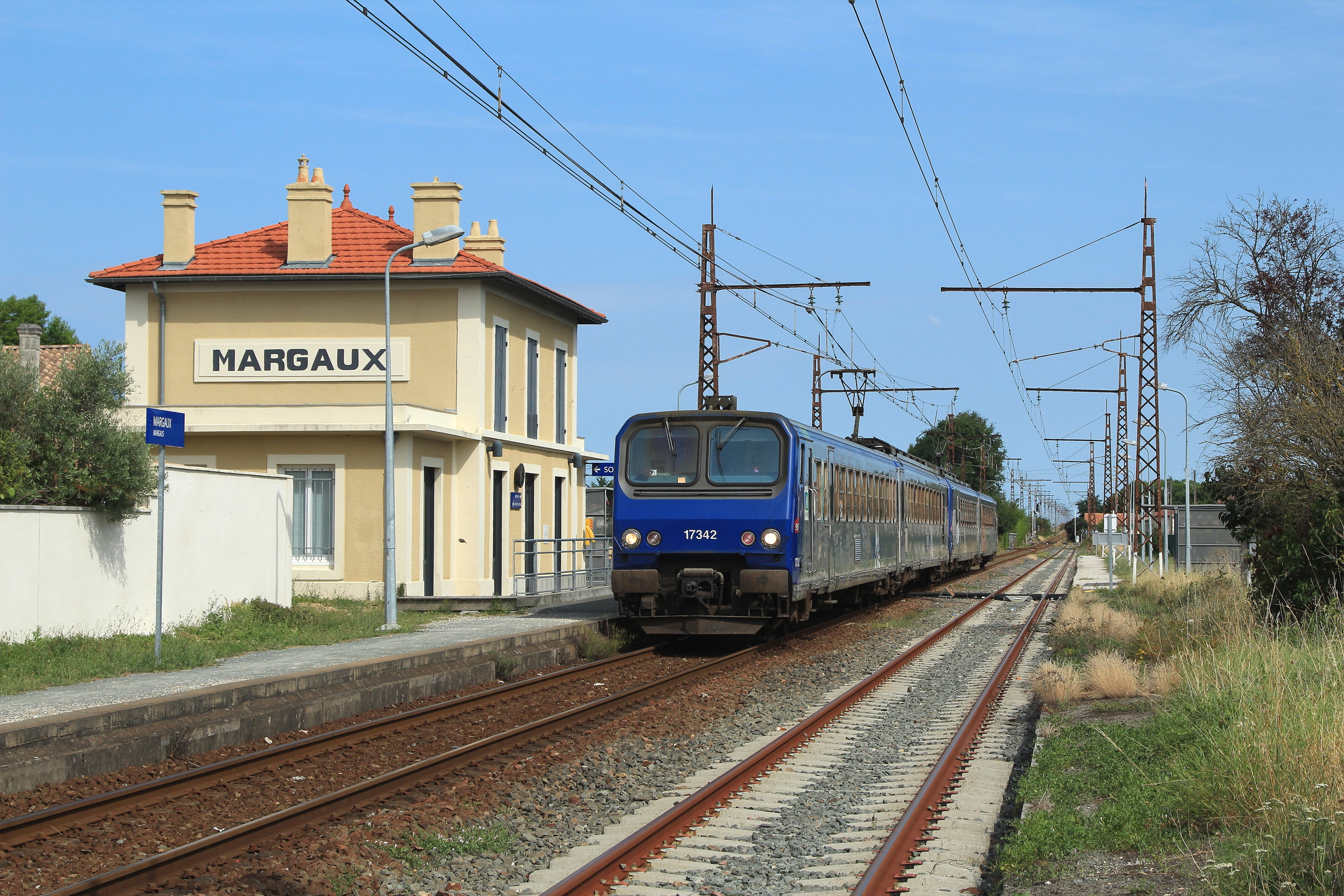 Deux Z2 arrivent en gare de Margaux, en provenance de Bordeaux.